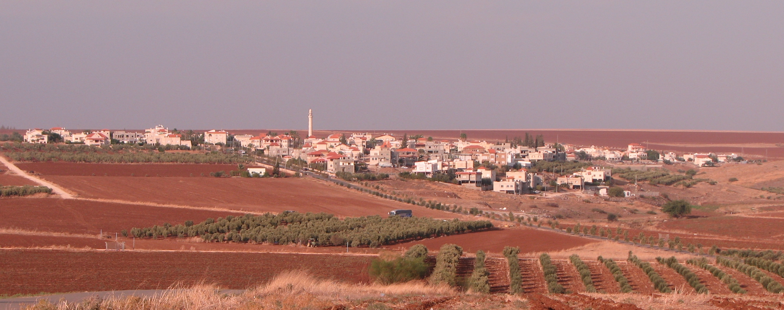 טייבה בעמק